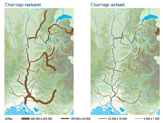 bilan du transit sédimentaire par charriage sur le Rhône